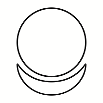 Знак Аллатра